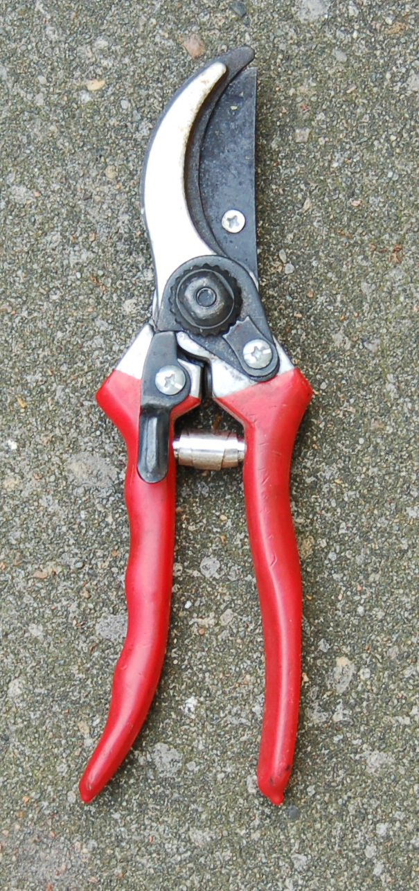 Secateur fermé - Closed secator